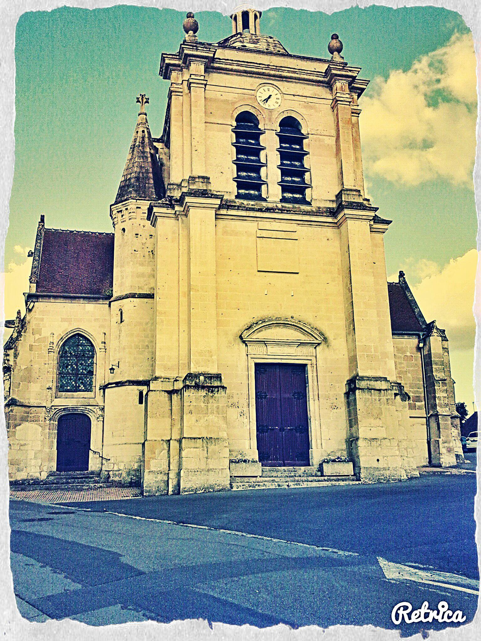 de l eglise